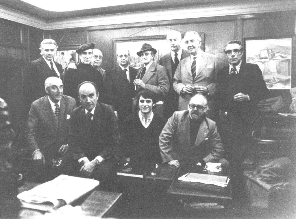 De pie: Francisco Gorrila, Julio Maruri, Luis Corona, Miguel Sáenz, Pío Muriedas, Arturo Acebal Idígoras, Jaime Olaso, Laureano Muñoz Viñarás.Agachados: Antonio Santafé Largacha, Féliz Unzueta, Roberto Sáenz de Gorbea, Mariano Corral y Líbano.